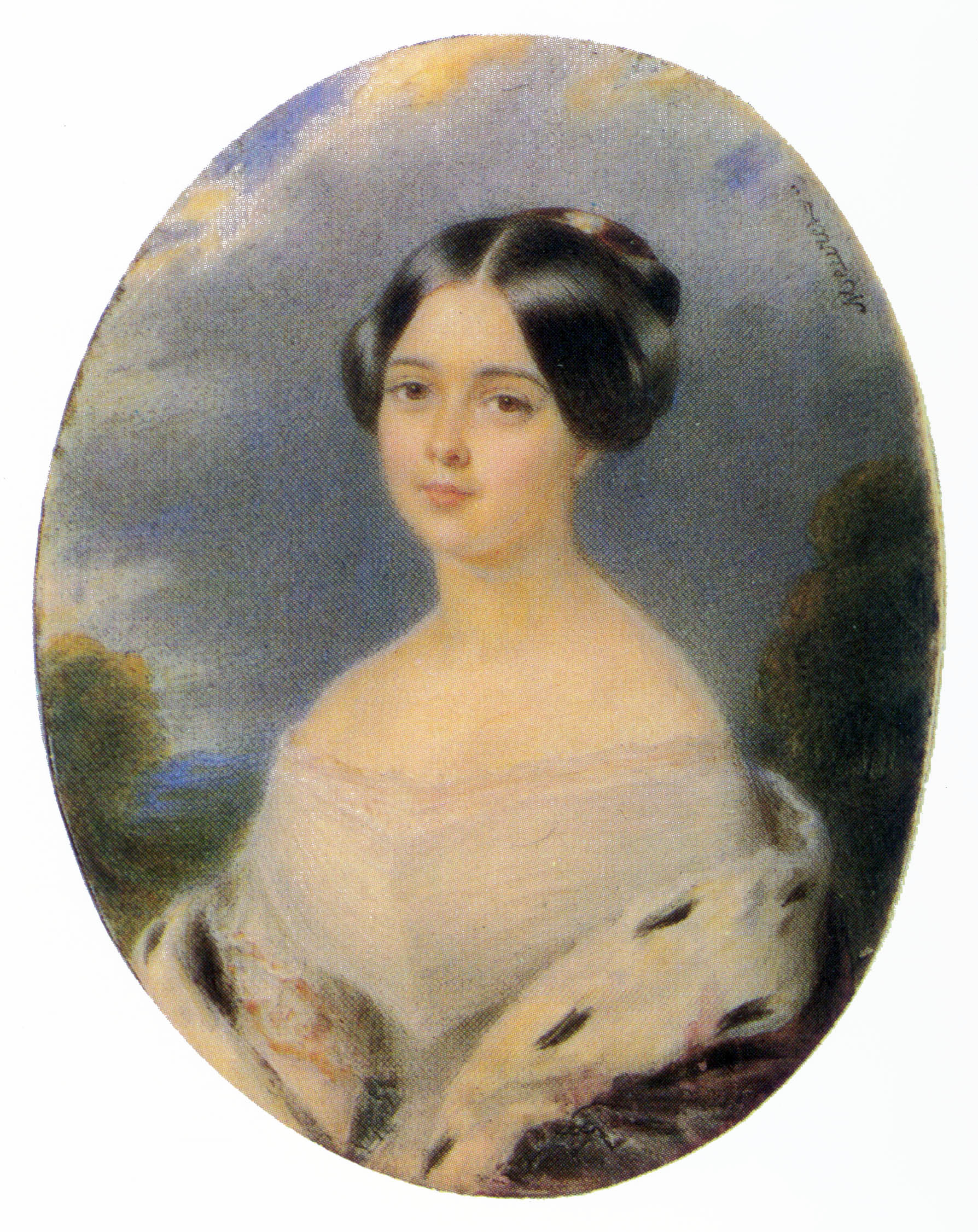 Зинаида Александровна Толь, ур. Голицына (1818-1845), внучка кн. Б.А.Голицына, единственная дочь А.Б.Голицына и А.В.Ланской, с мая 1845 года замужем за К.К.Толем.